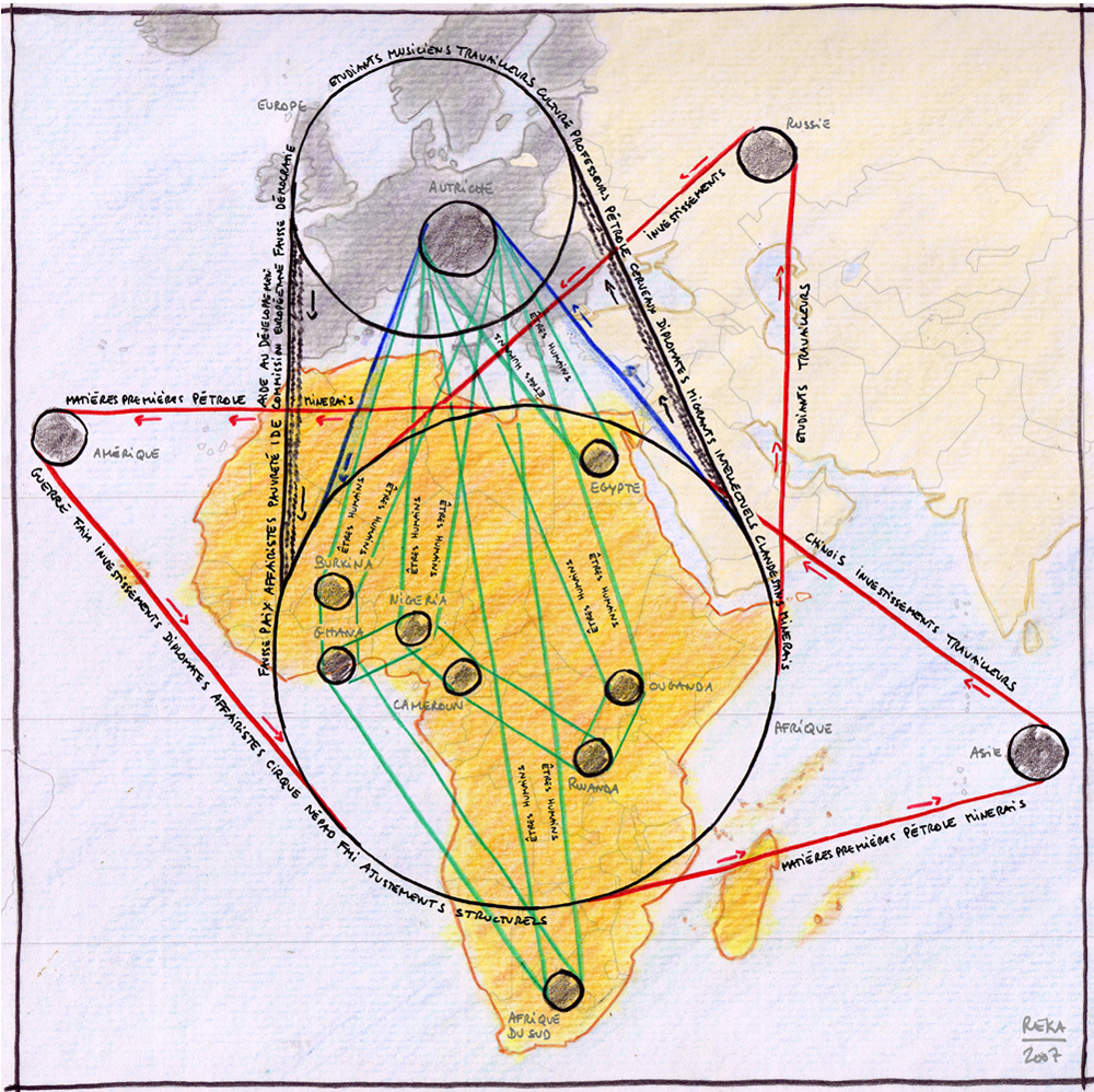 Carte présentée au musée d'art moderne de Vienne en Autriche, en novembre 2007, lors de l'exposition « Waypoint to Sharon Stone » (Rendez-vous à Sharon Stone). C'est une représentation critique de l'Afrique dans ces relations avec le monde en général, et l'Autriche en particulier.